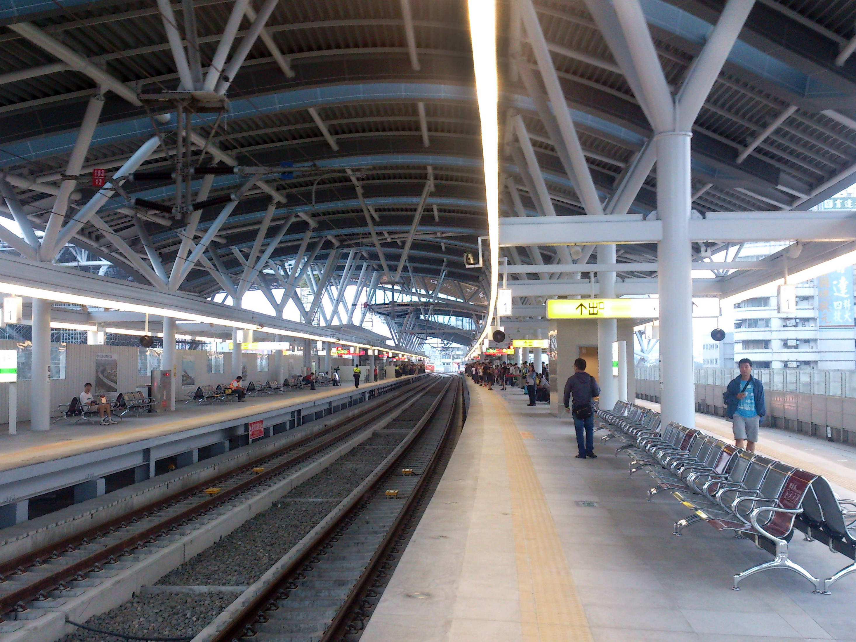 臺中車站1B月台